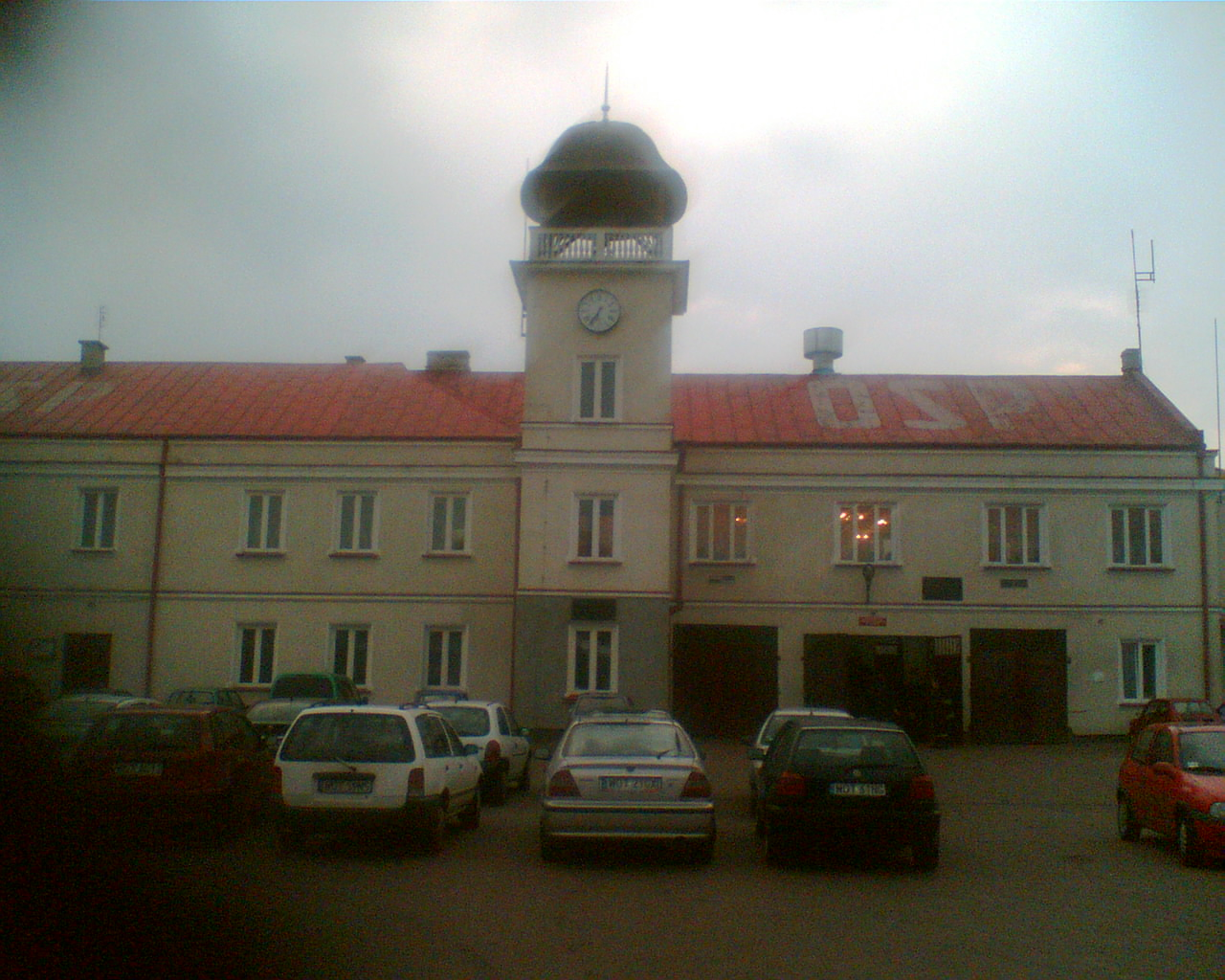 W centrum Karczewa - budynek OSP